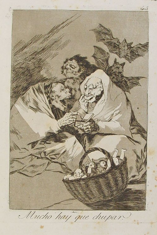 Capricho nº 45: Mucho hay que chupar de Goya, serie Los Caprichos